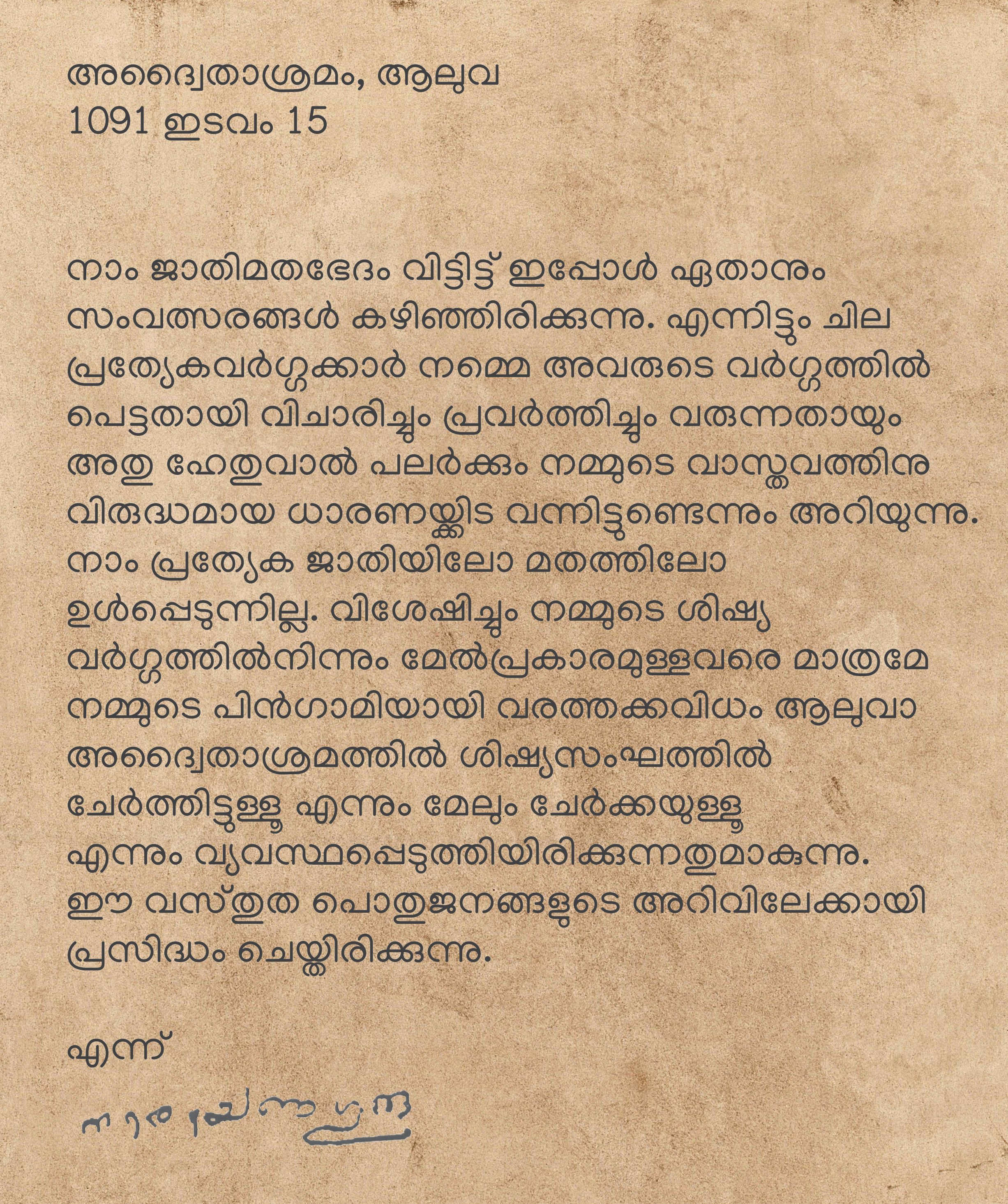 നമുക്കു ജാതിയില്ല - വിളംബരം - ശ്രീനാരായണഗുരുവിന്റെ ജാതിയില്ലാ വിളംബരത്തിന്റെ പുനരാവിഷ്കാരം.